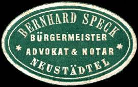 Sealing stamp Title: Bernhard Speck - Bürgermeister - Advocat (Rechtsanwalt) & Notar - Neustädtel Description: grün, weiß, geprägt Place: Neustädtel size: 2x4 cm